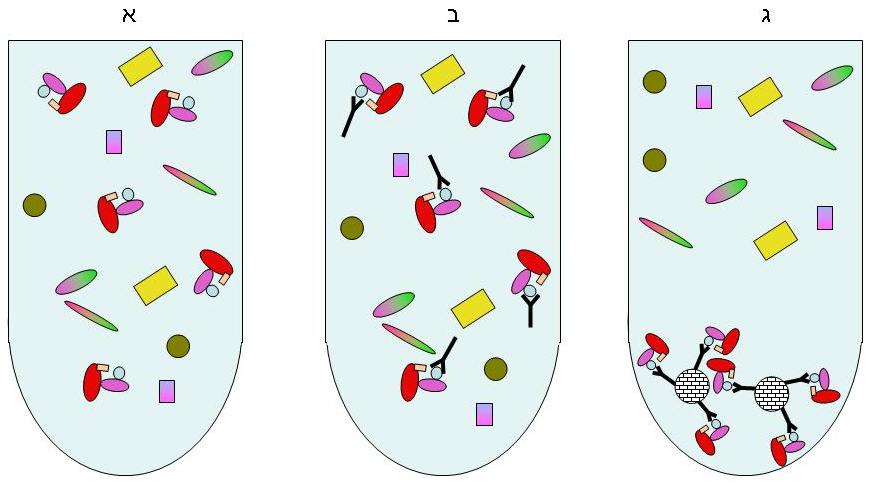 Immunoprecipitation -אימיונו פרספיטציה- השקעה בעזרת נוגדים א. תמיסה מימית המכילה חלבונים רבים. ב. לתמיסה מוכנסים נוגדנים המזהים את אחד החלבונים (עיגול כחול). החלבון המזוהה נמצא בקומלקס עם חלבונים אחרים. ג. לתמיסה מוכנסים חלקיקים בלתי מומסים הקושרים נוגדנים. החלקיקים, הנוגדנים וקומלקס החלבונים הקשור אליהם שוקעים לתחתית המבחנה לאחר סירכוז (בצנטריפוגה). ניתן לפרק את קומפלקס החלבונים מן החלקיק הבלתי מסיס על ידי חשיפה pH חומצי או לתנאים לדטרגנטים.